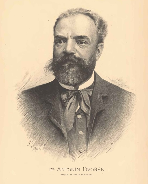 Antonín Dvořák (1841-1904), český skladatel. Portréty českých osobností od Jana Vilímka